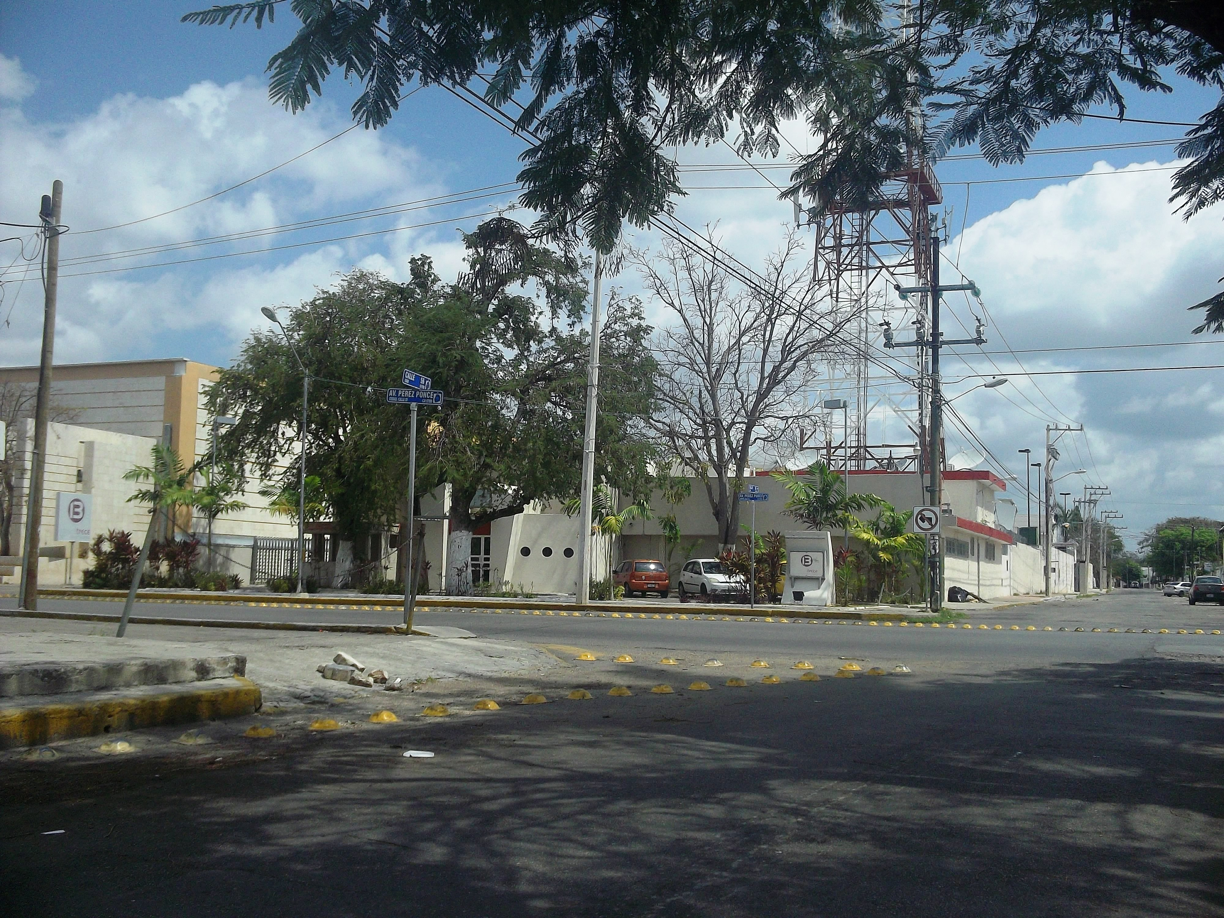 Televisión de Yucatán, Mérida, Yucatán.